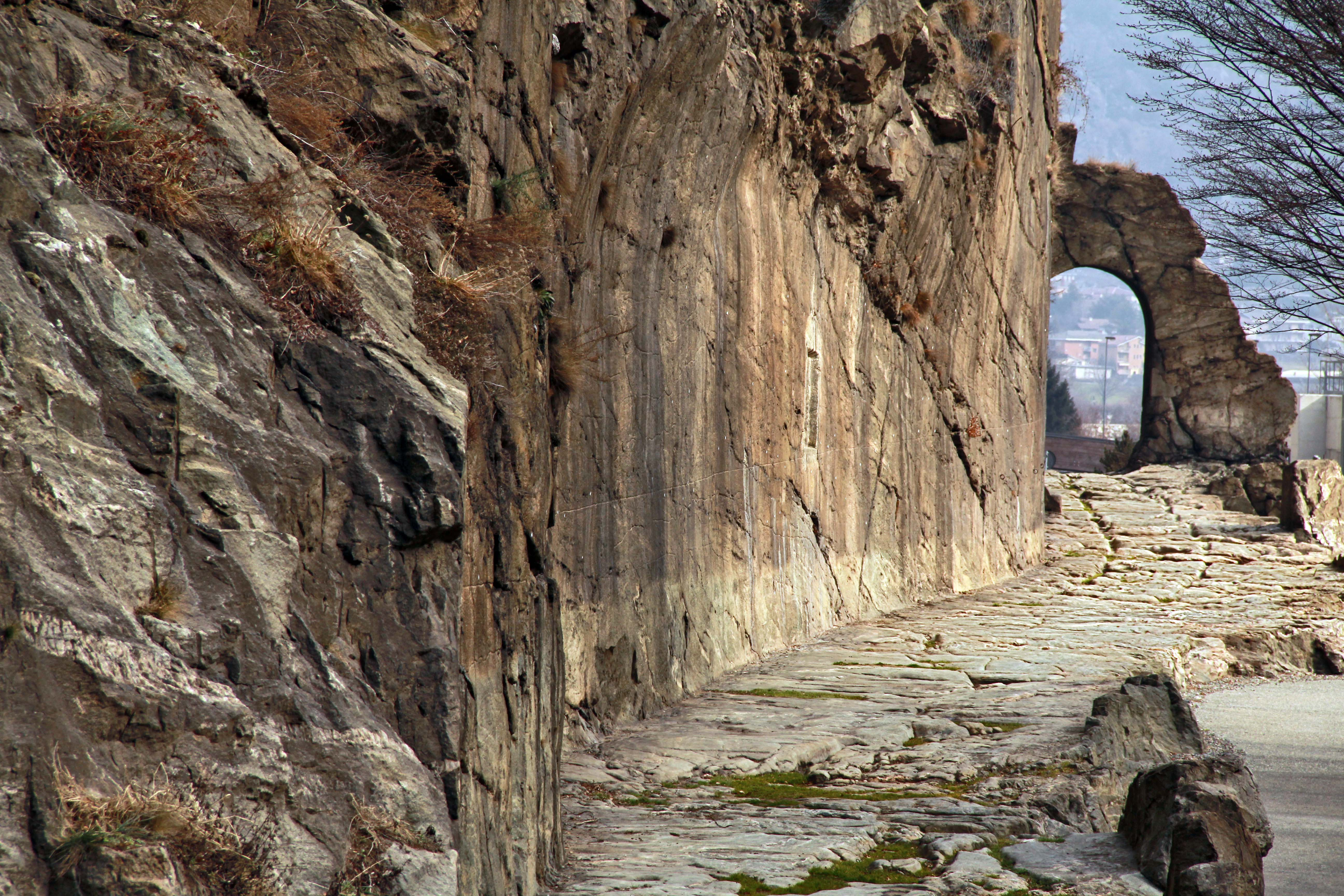 Tratto della via consolare delle Gallie This is a photo of a monument which is part of cultural heritage of Italy.